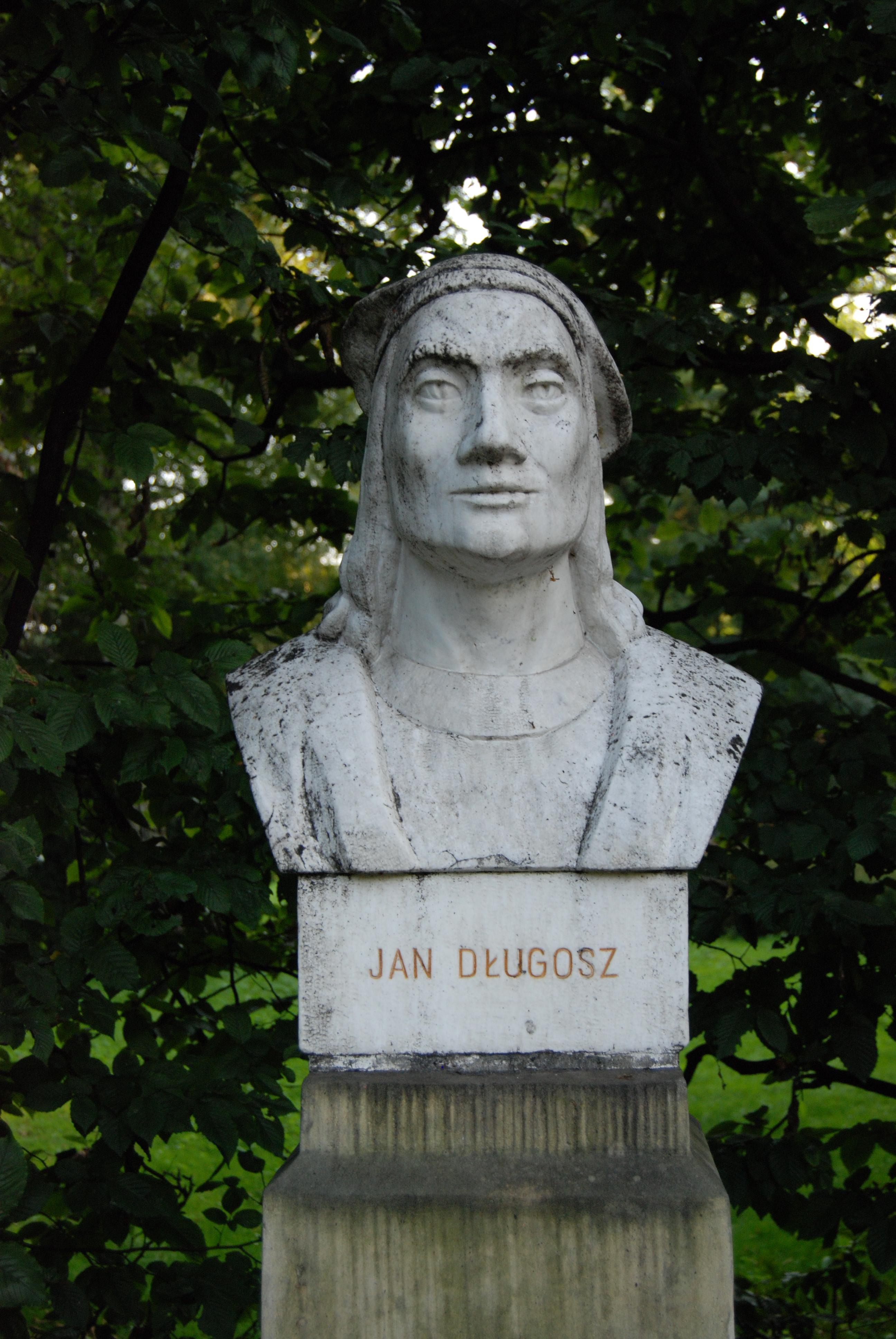 Pomnik Jana Długosza w Parku Jordana w Krakowie